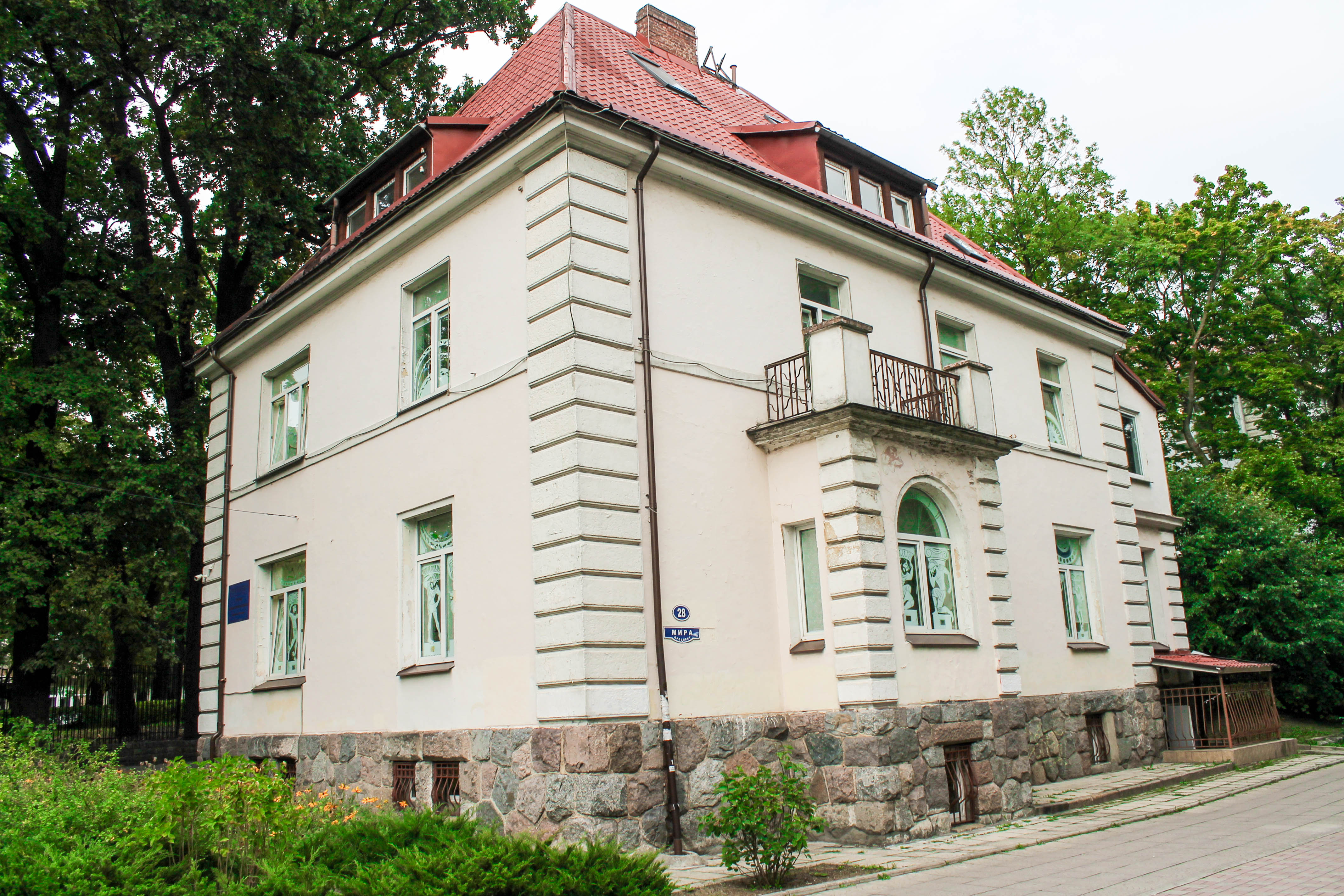 Дом директора хуфенской гимназии: проспект Мира, 28, Калининград, Калининградская область